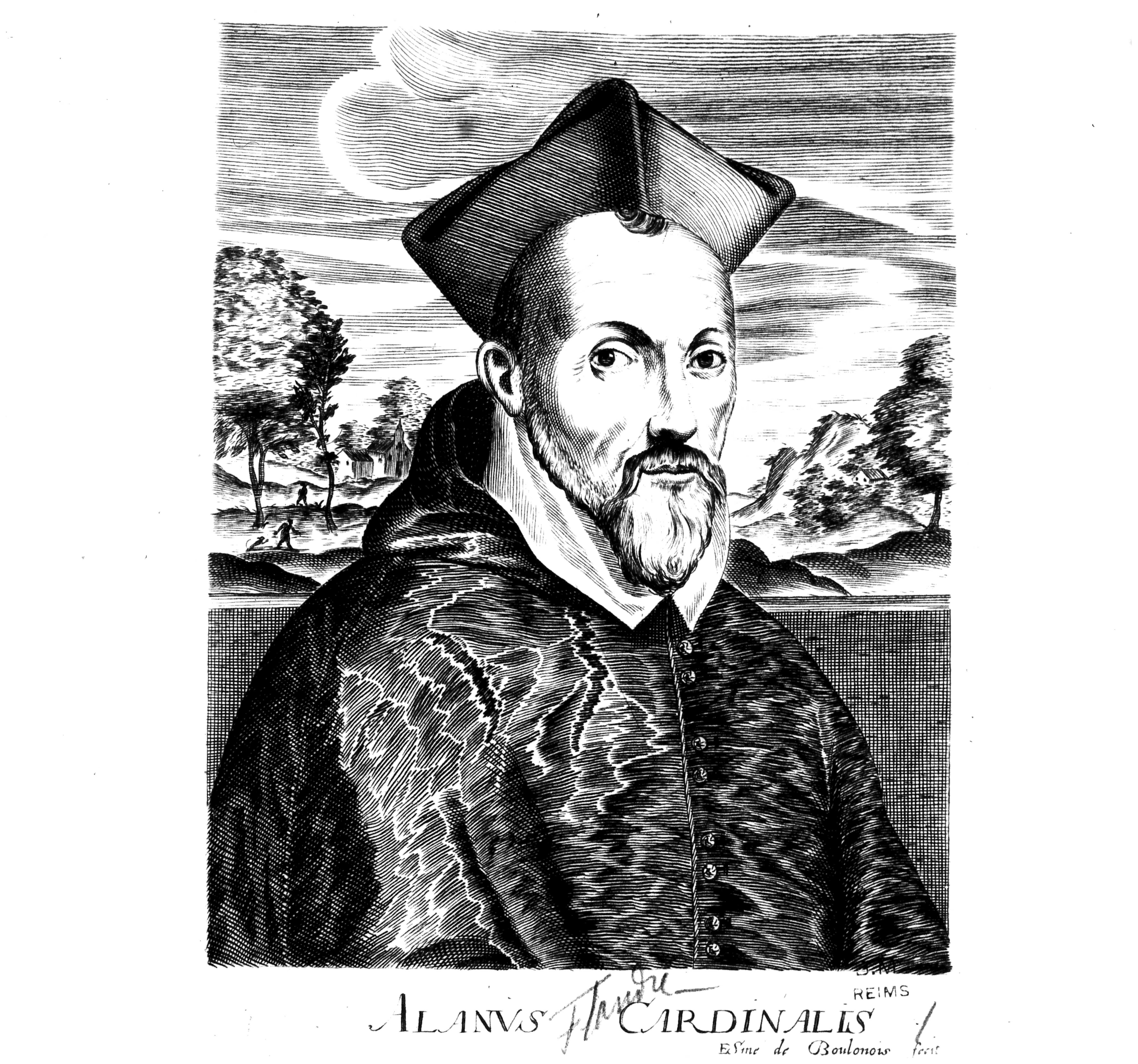 image du cardinal.